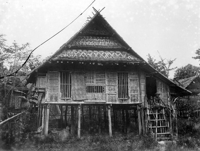 Negatief. Paalwoning, Sulawesi